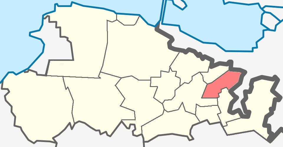 Аннинское сельское поселение Ломоносовского района Ленинградской области.